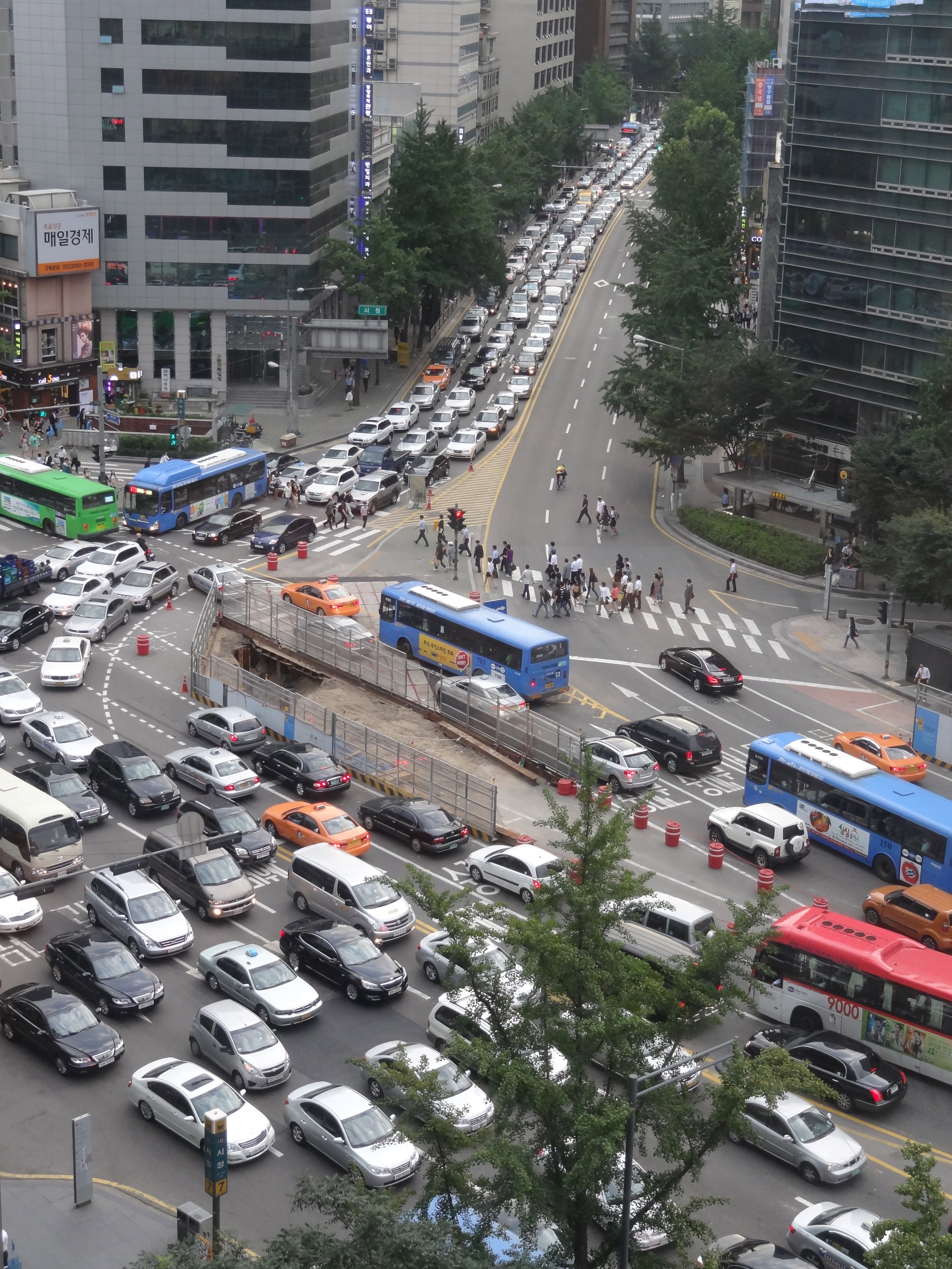 ソウルの帰宅ラッシュ（ソウル特別市中区）